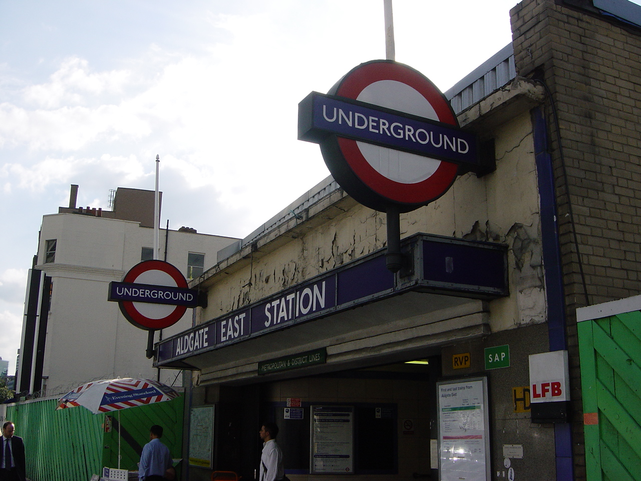 Une des entrées/sorties de la station Aldgate East sur le réseau du métro à Londres. Juillet 2006